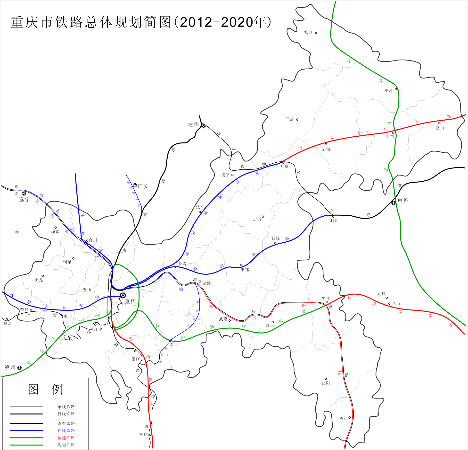 重庆铁路总体规划简图（2012-2020年）